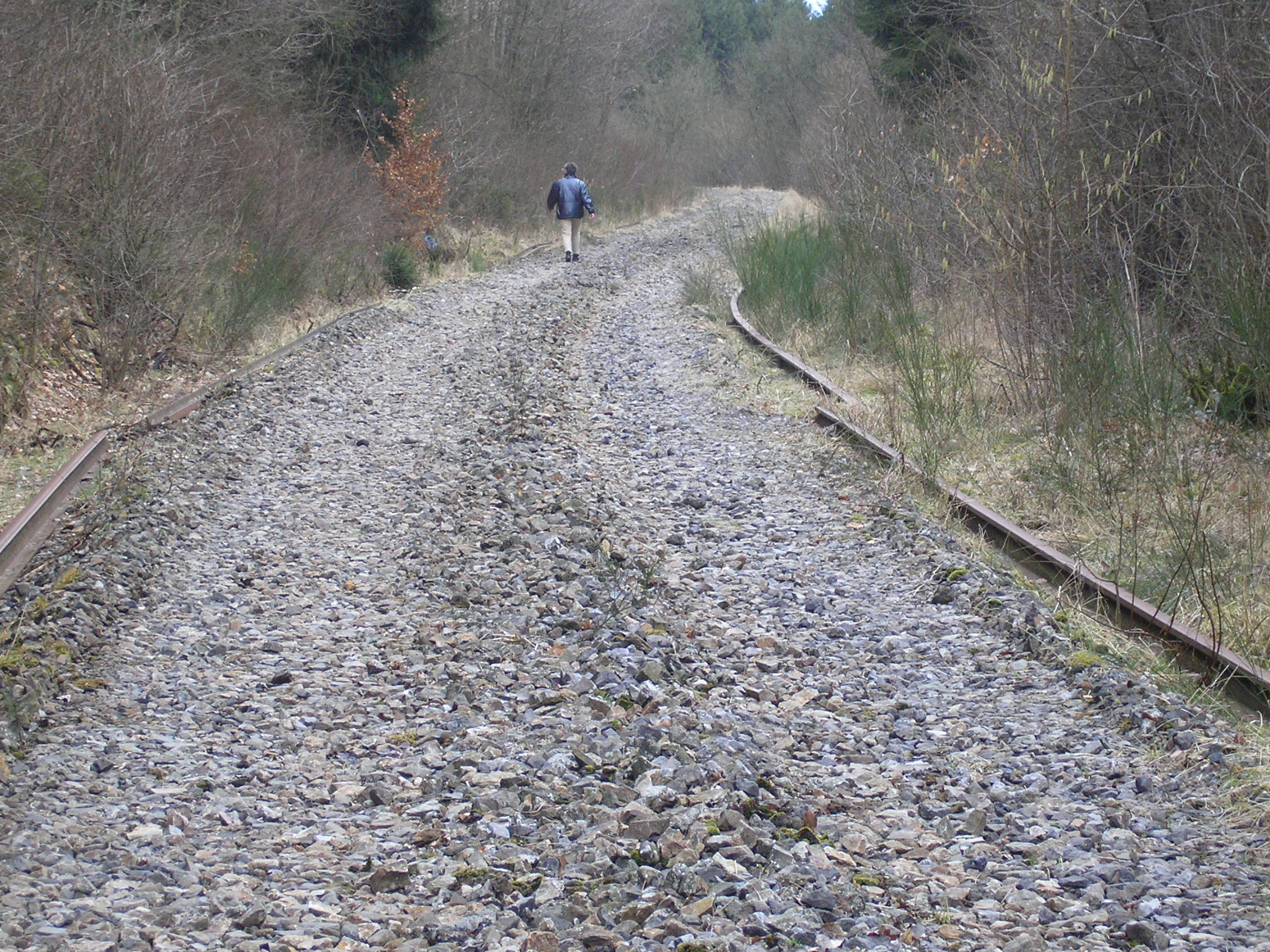 RAVeL 48, alte Vennbahnstrecke, East Belgium, Die Schienen der alten Vennbahn sind entfernt. Strecke zwischen Haltepunkt Robertville und Weywertz.